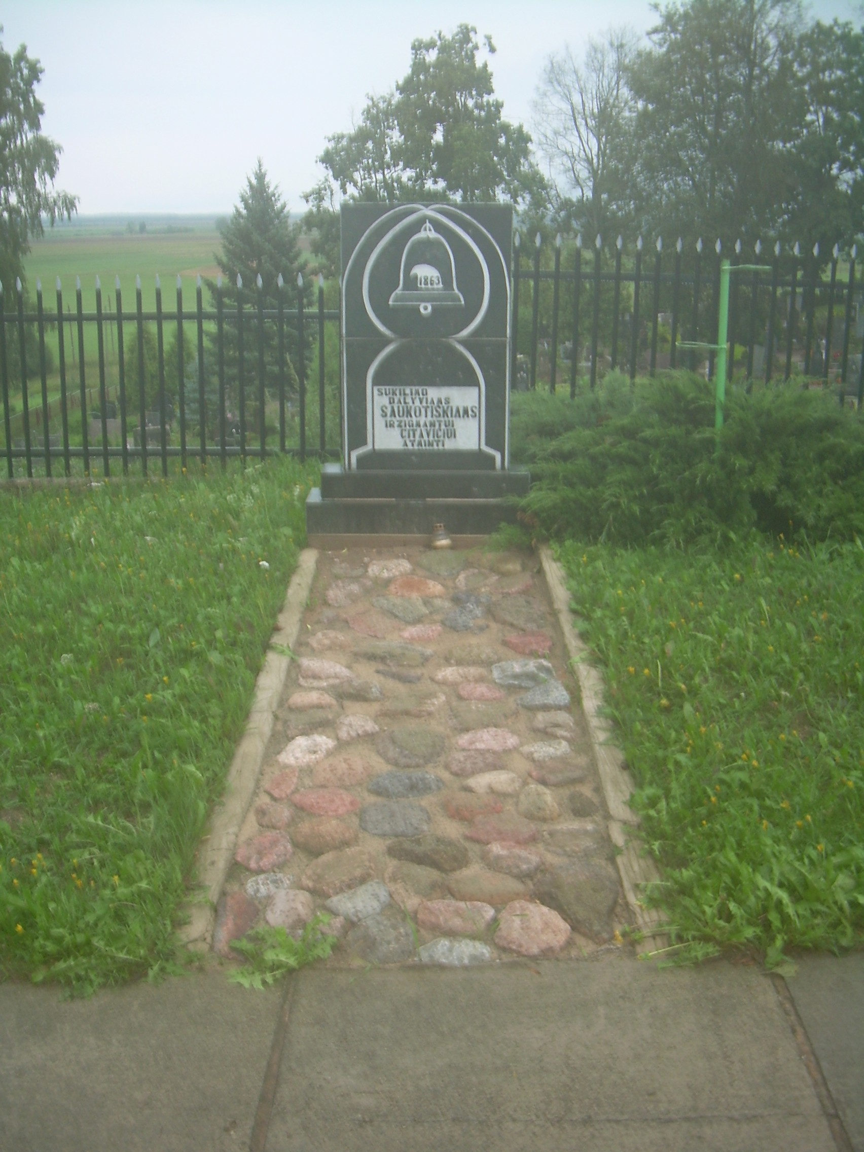 Šaukoto Švč. Trejybės bažnyčia